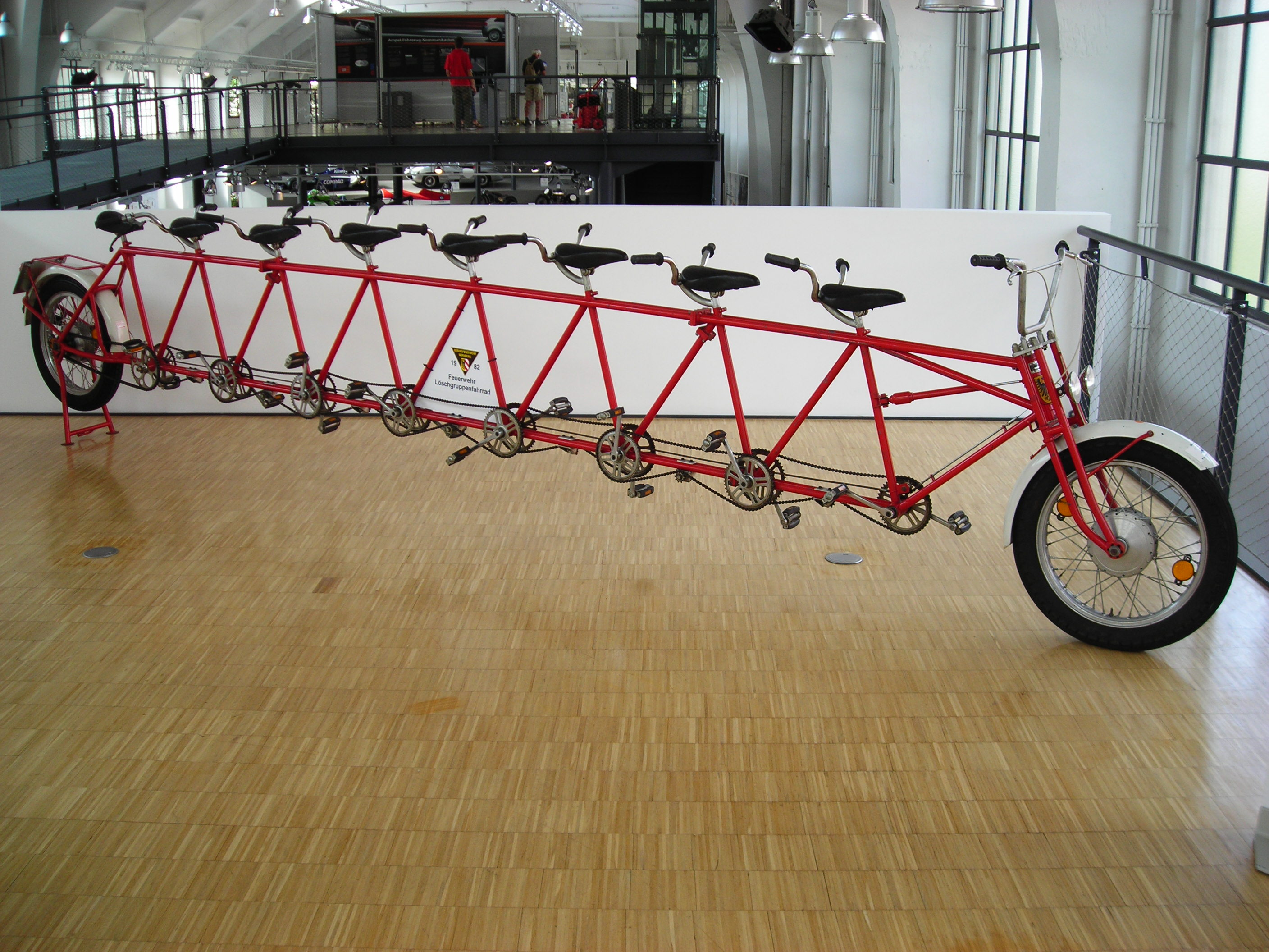 Löschgruppen-Fahrrad, 1982 von Beamten der Berufsfeuerwehr Nürnberg (Bayern) gebaut. Daten: 8 Sitze, Länge 5,85 m, Radstand 4,90 m, Leergewicht 110 kg, 1.056 Kettenglieder. Es diente nicht als Einsatzfahrzeug. Exponat im Deutschen Museum Verkehrszentrum, Halle III, I. OG